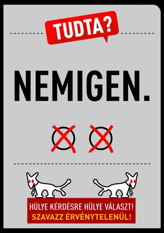 „Hülye kérdésre hülye választ!“ - „Szavazz érvénytelenül!“ A Magyar Kétfarkú Kutyapárt 2016-os népszavazási plakátjainak egyike